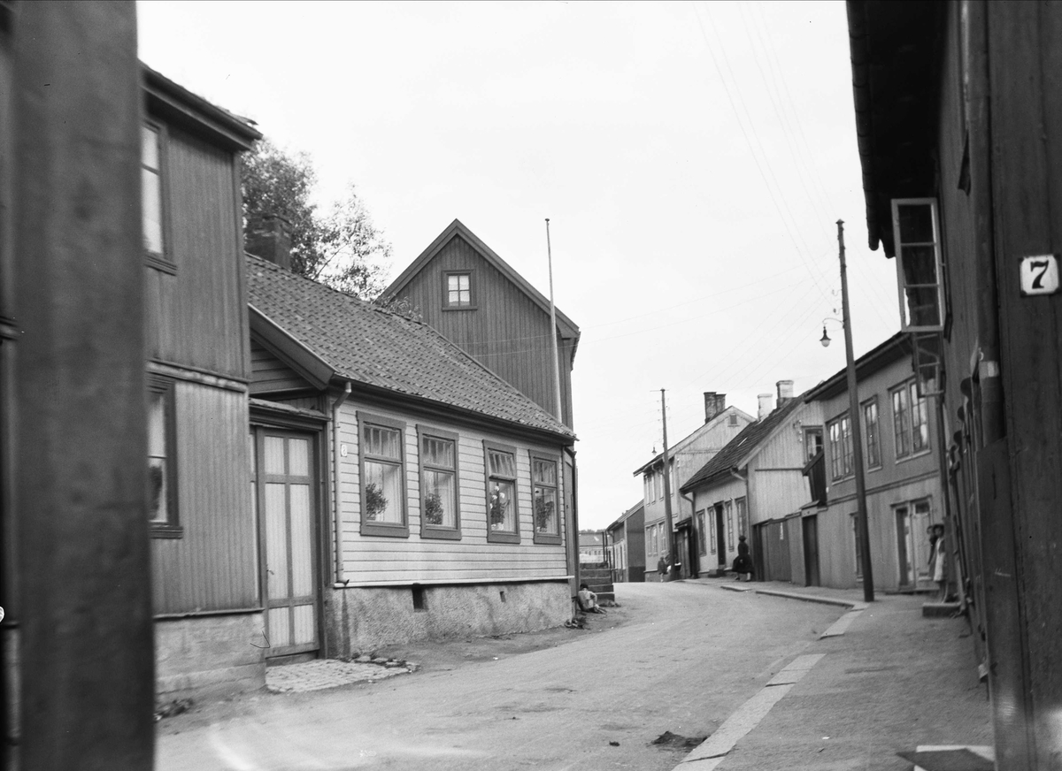 Hølandsgata 1931, nordøstover fra Normannsgata